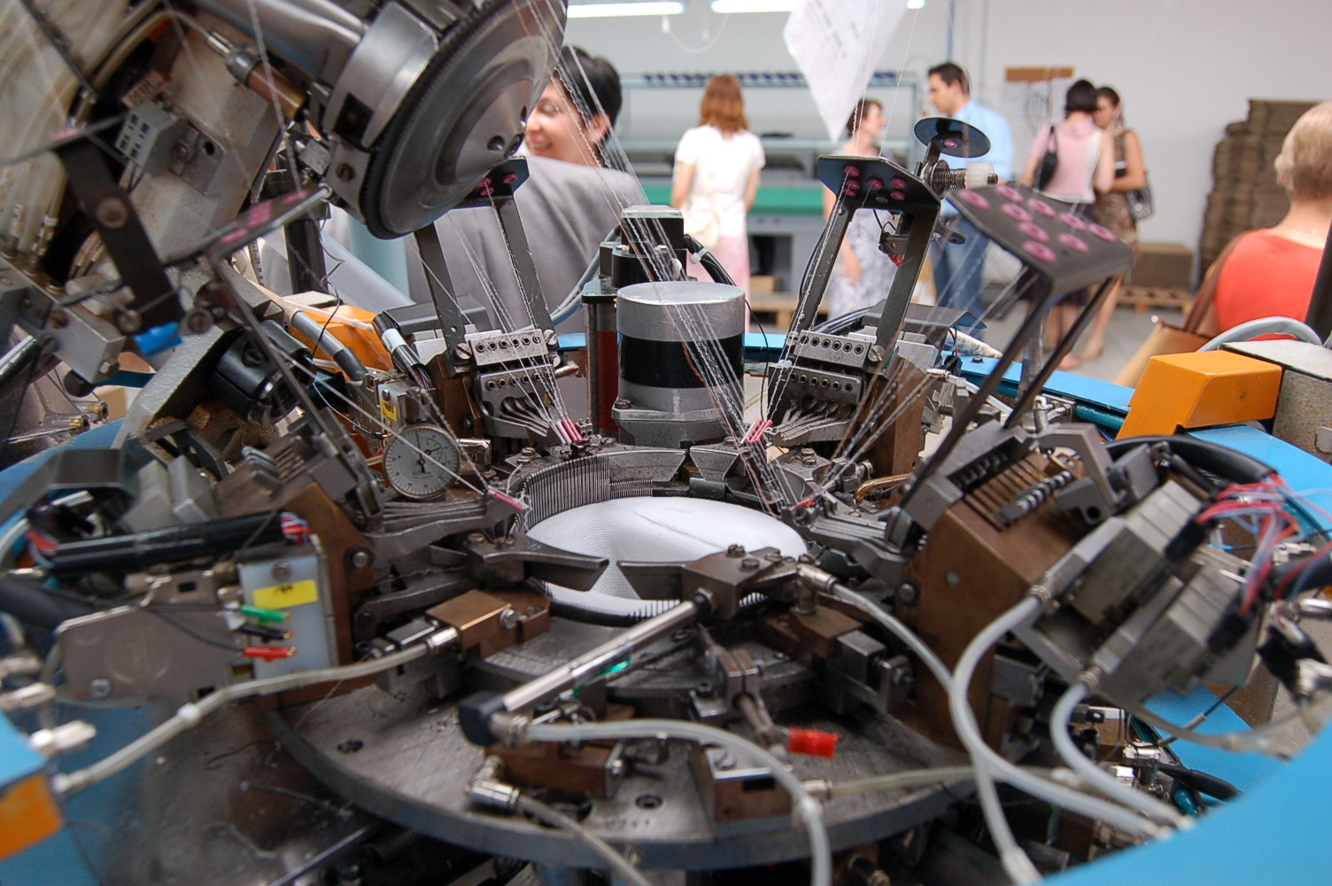 Harisnyakötőgép kötőfeje felnyitott állapotban (Románia)